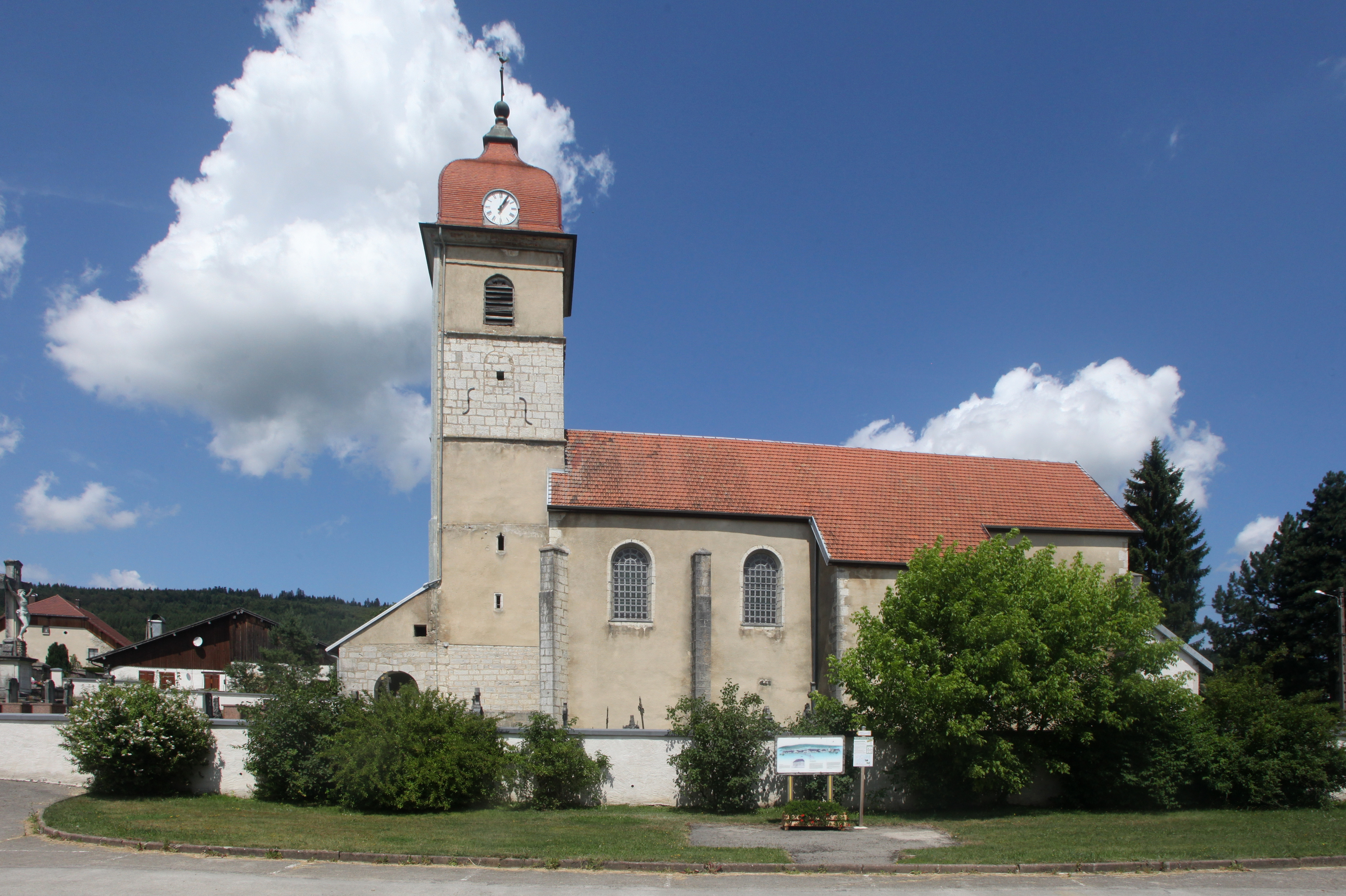 Église d'Évillers (Doubs).